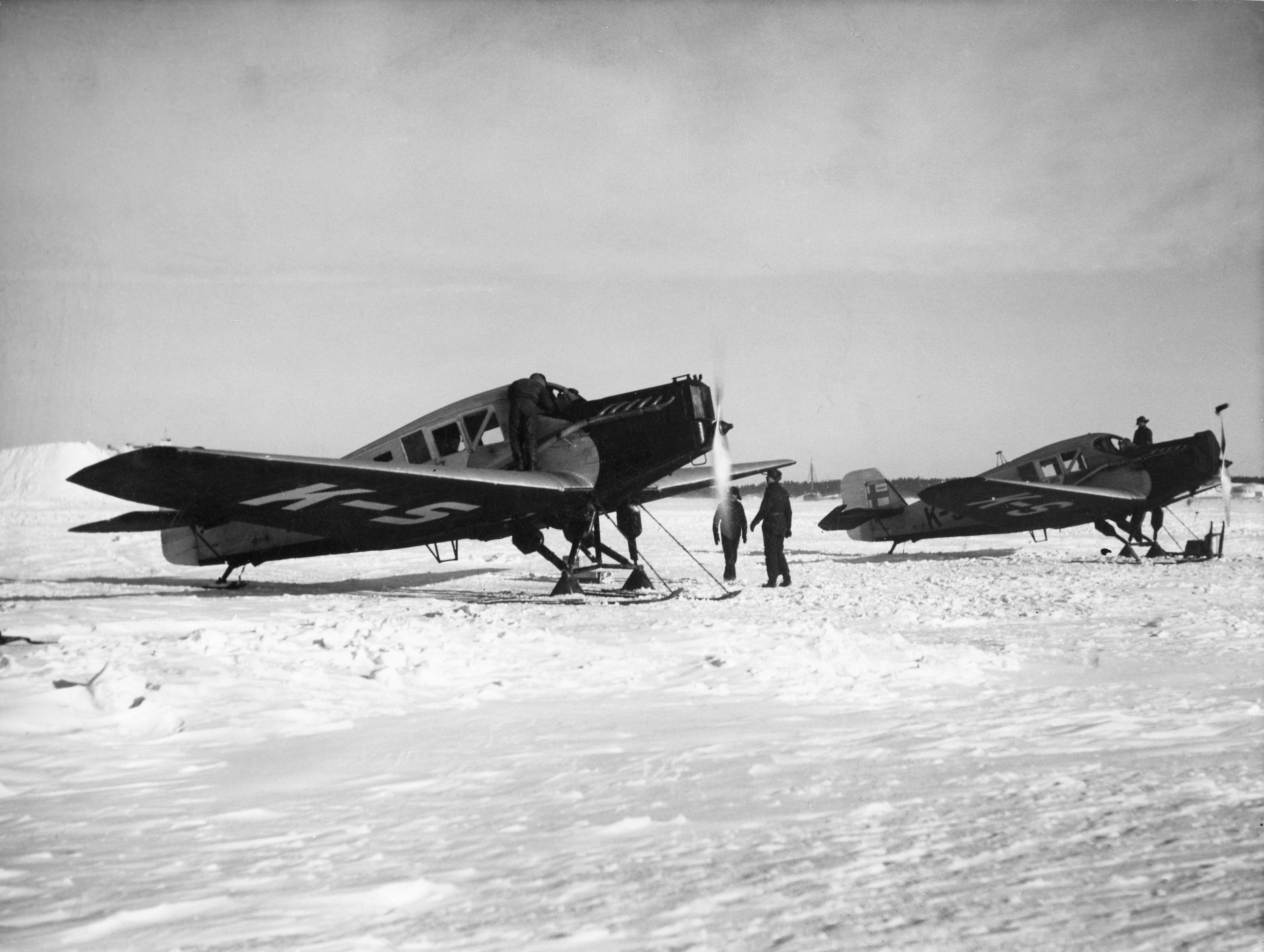 Yhtiön ensimmäinen konetyyppi: Aero Oy:n Junkers F.13 -matkustajakoneita suksivarustuksessa 1920-luvulla.